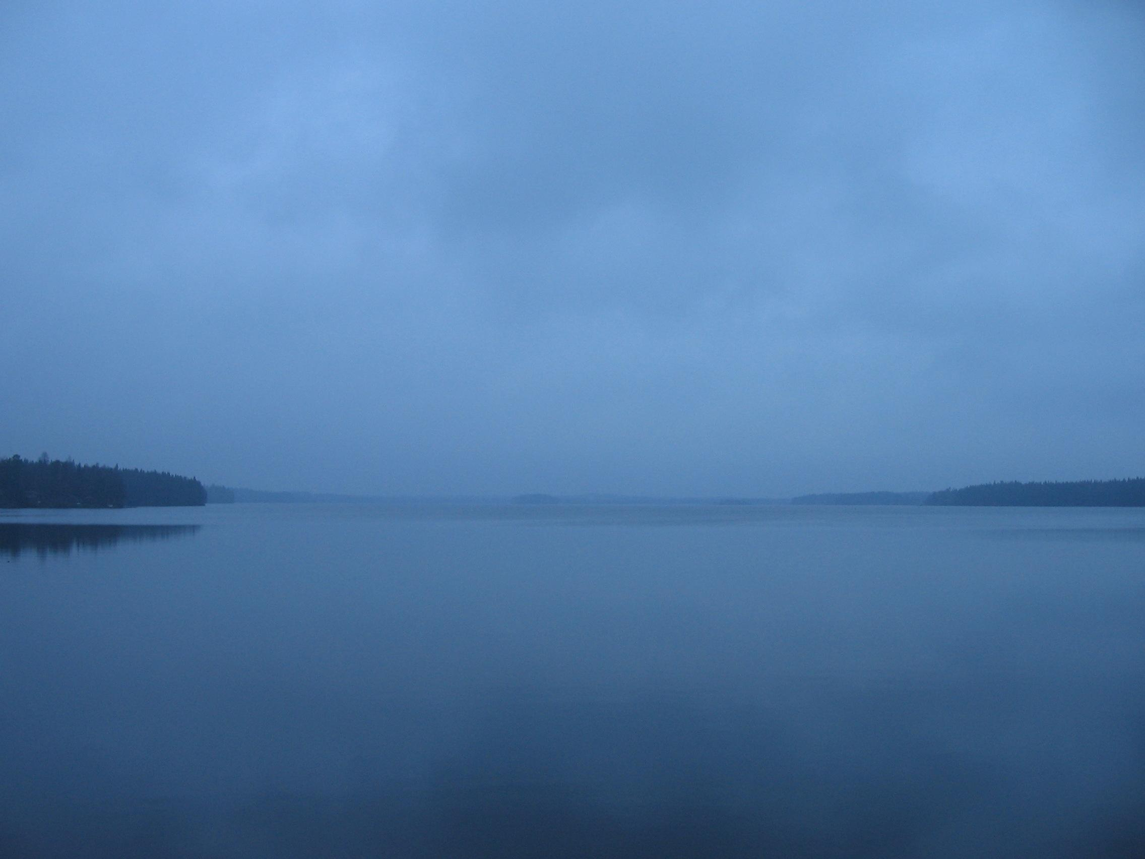 Storesjön, insjö i Nässjö kommun utanför samhället Bodafors i Småland. Sjön är belägen 286 m ö.h. och utgör den huvudsakliga källan till Emån som rinner från sjön. Från tåget har man en vacker utsikt över sjön. Sjön är även känd för att Södra Stambanan genomklyver den och järnvägen har gjort så allt sedan banan byggdes på 1860-talet. Banan går huvudsakligen på en bank med öppningar vilket delar sjön i Storesjön och Lillesjön. Sjön har varit större tidigare men 1800-talets järnvägsbyggen och utdikningar för att vinna åkermark har gjort att den har krympt.